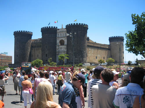 Крепость Маскио Анжуино, Неаполь